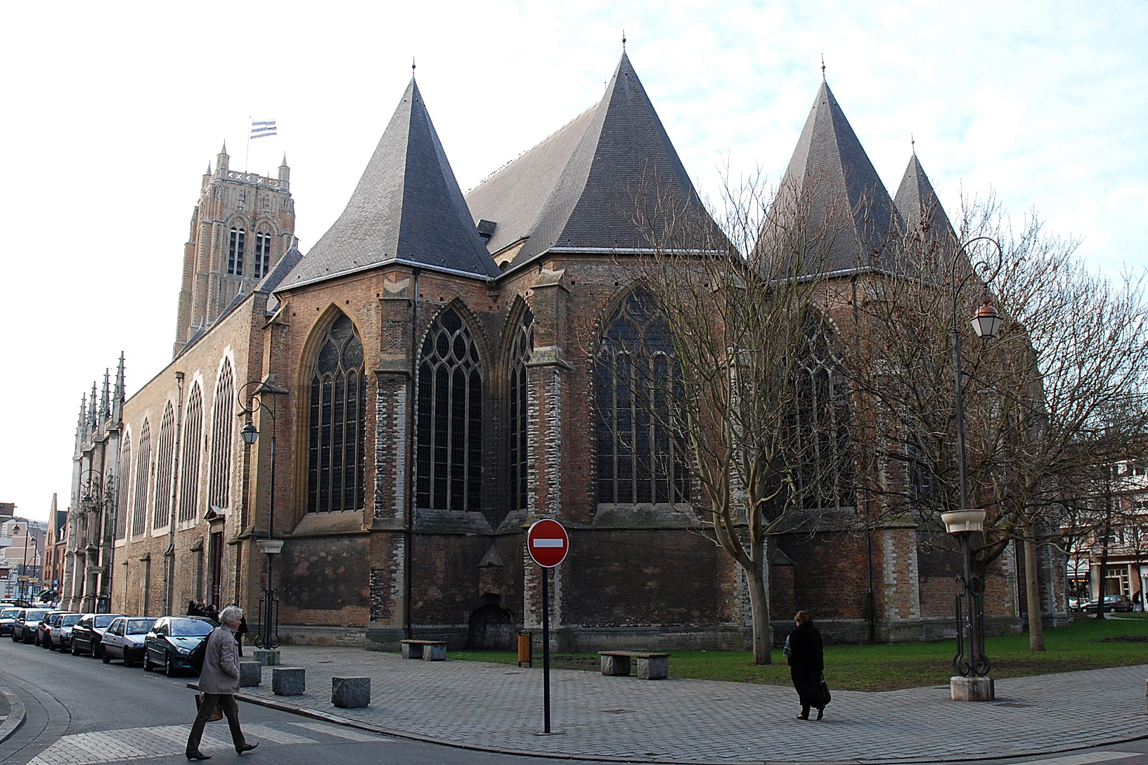 l'église Saint Eloi à Dunkerque